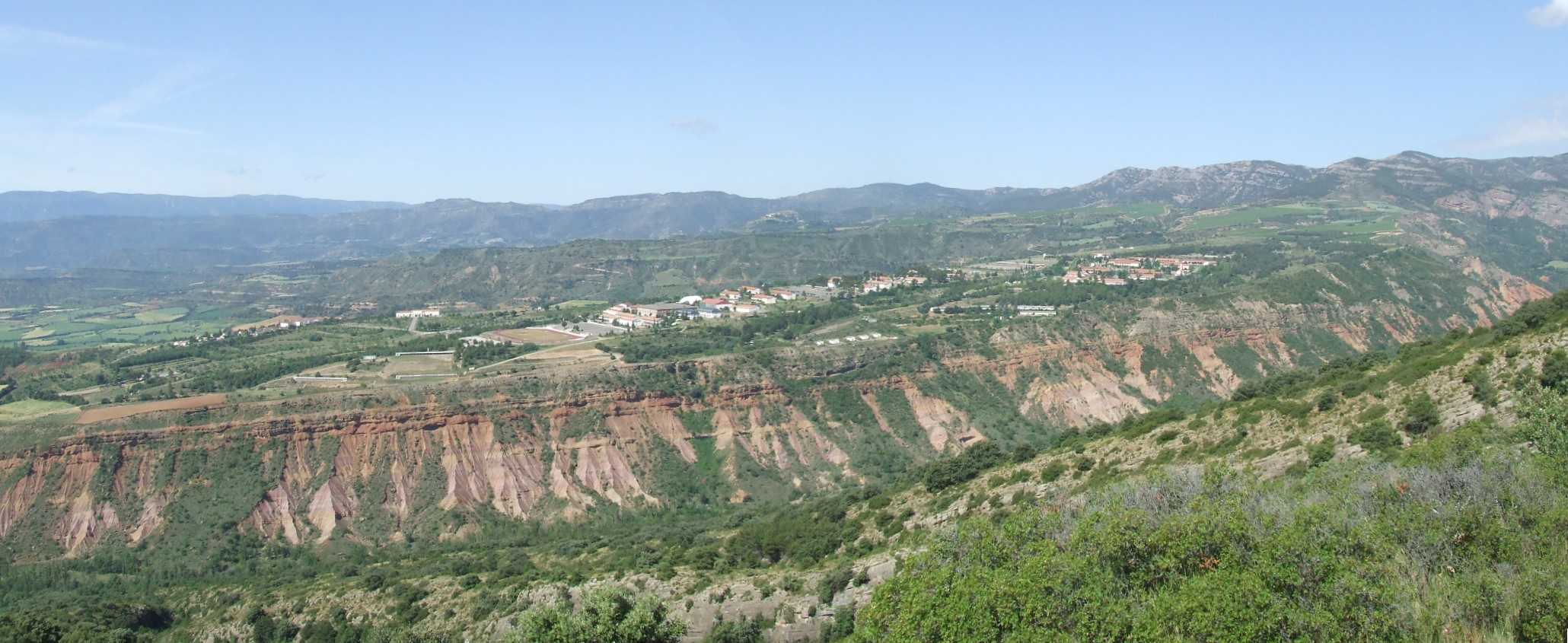 L'Acadèmia General Bàsica de Sotsoficials de Talarn, des de Castilló d'Encús (Talarn, Pallars Jussà)